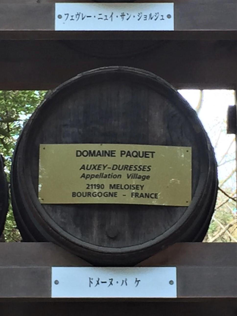 Fass Domaine Paquet Auxey-Duresses Appellation Village ausgestellt im Yoyogi-Park in Tokio.